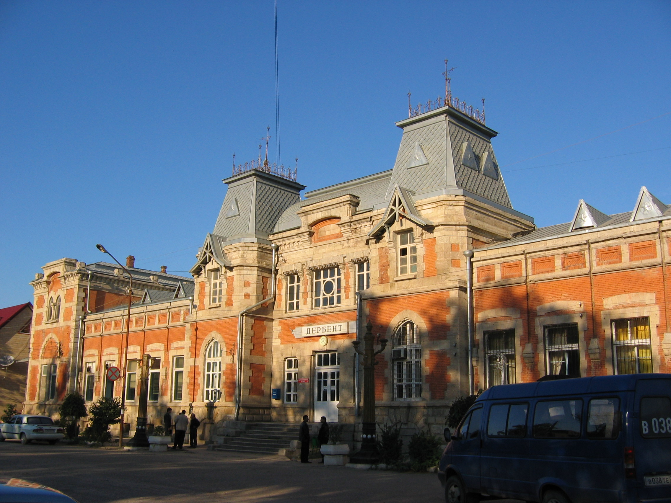 Вокзал ст. Дербент в 2005 г.